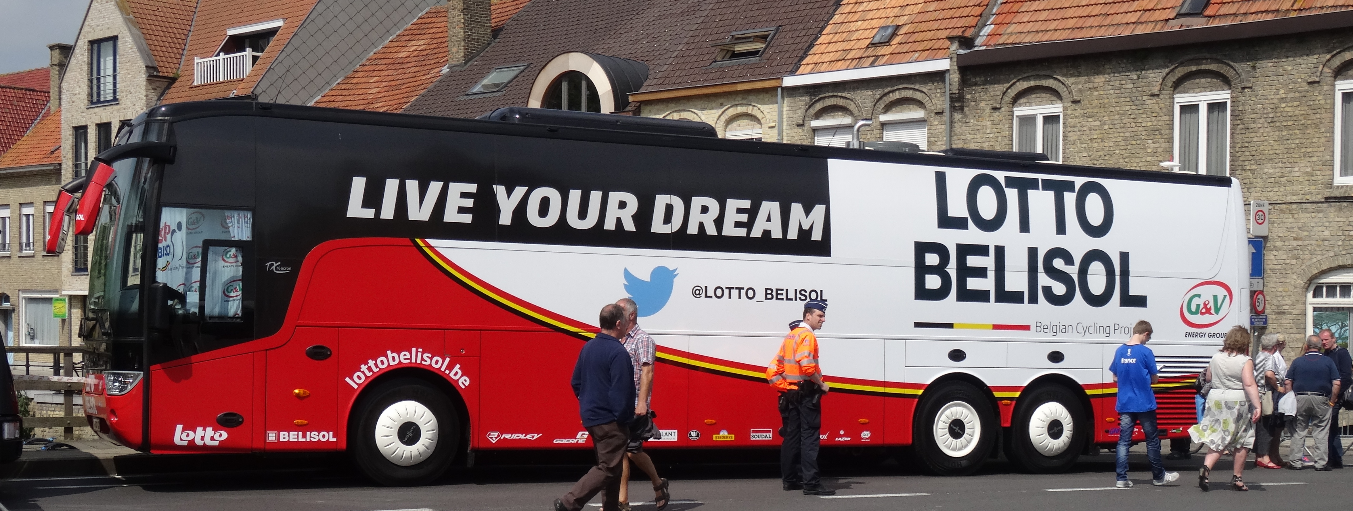 Reportage photographique réalisé le vendredi 30 mai à l'occasion du contre-la-montre individuel de la troisième étape du Tour de Belgique 2014 à Dixmude, Belgique.